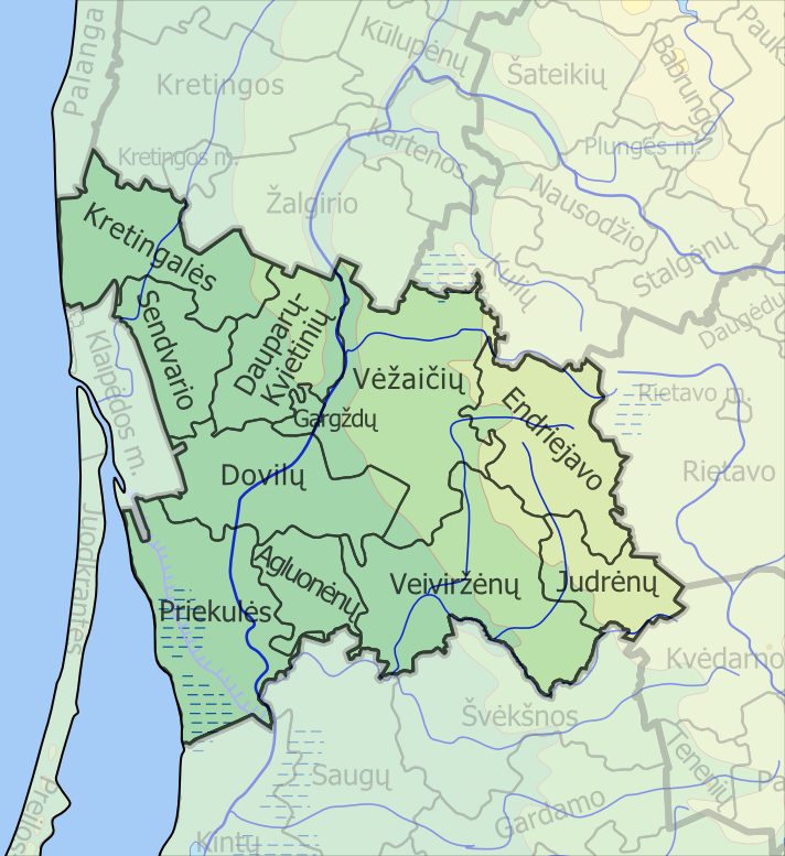 Klaipėdos rajonas. Padaryta iš :image:LietuvosSeniunijos.png